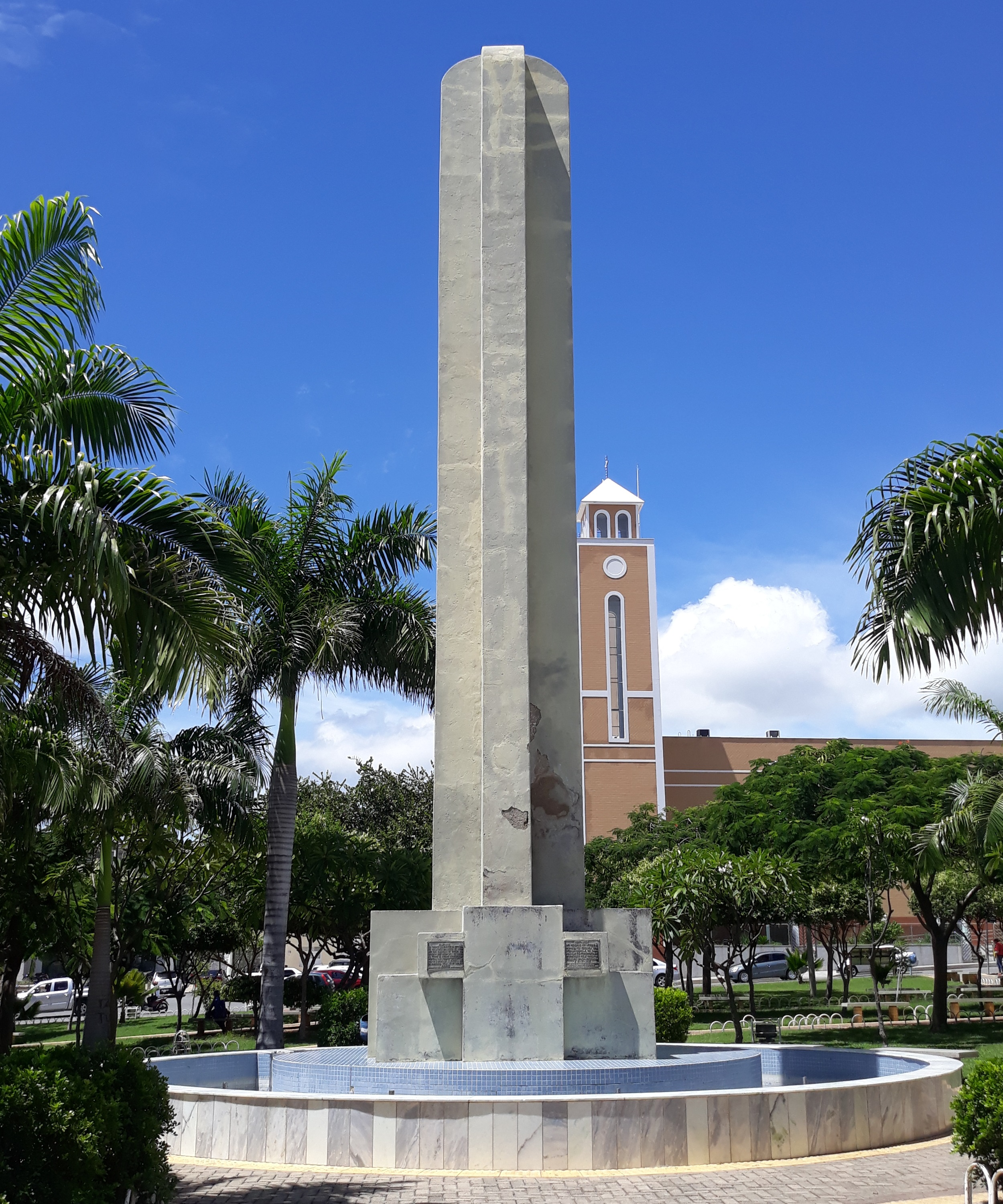 Obelisco da Praça Monsenhor Caminha, em Pau dos Ferros, estado do Rio Grande do Norte, Brasil. Ao fundo, a Igreja Matriz de Nossa Senhora da Conceição.